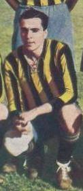 Luis Indaco